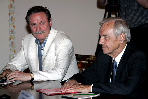 Художественный руководитель Государственного академического Малого театра России Юрий Соломин (слева) и художественный руководитель Российского государственного академического Большого драматического театра им.Г.А.Товстоногова Кирилл Лавров (справа).